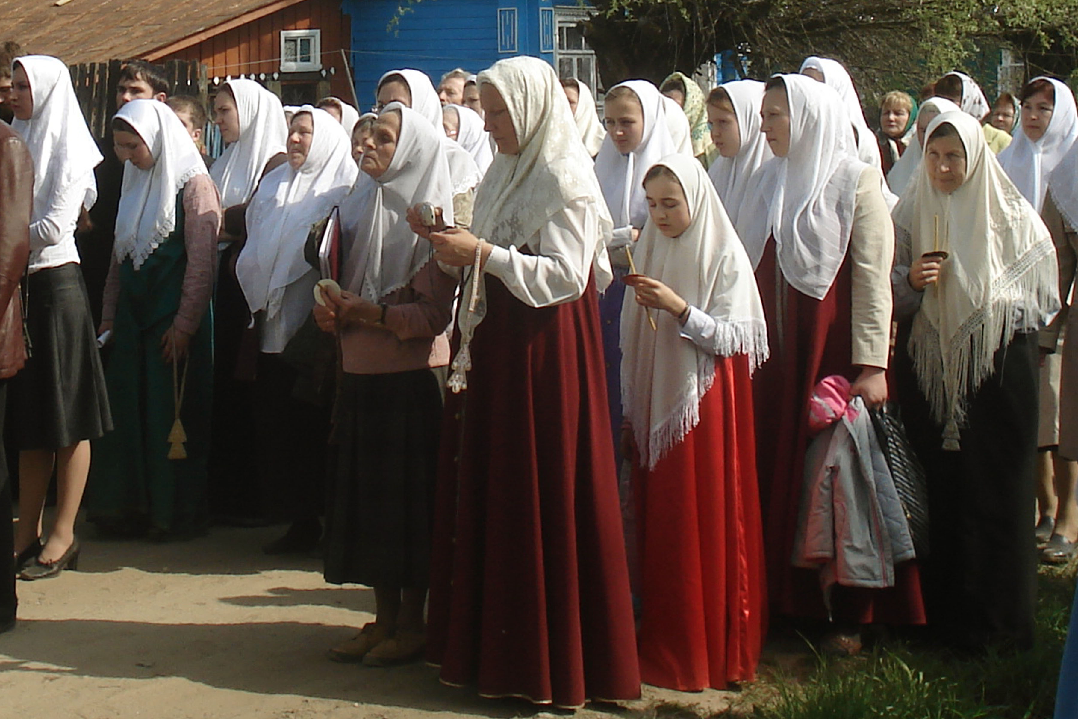 Te Deum. Russian Orthodox Old-Rite Church. Yelizarovo, Orekhovo-Zuyevsky District, Moscow Oblast (Guslitsa) / Молитва во время старообрядческого (РПСЦ) пасхального крестного хода в деревне Елизарово (Гуслицы), Орехово-Зуевского района, 02 мая 2008 г.